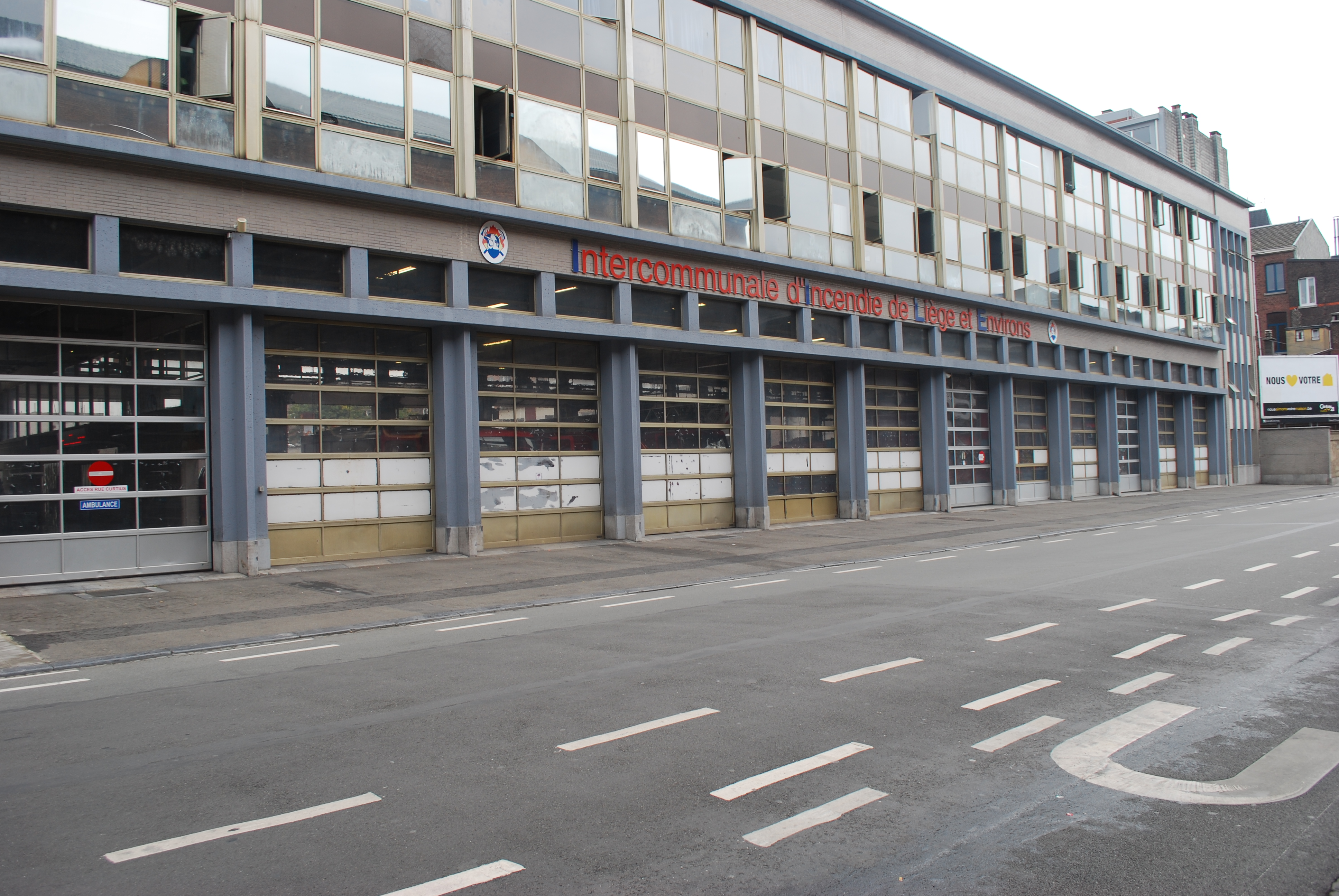 Vue de Liège.